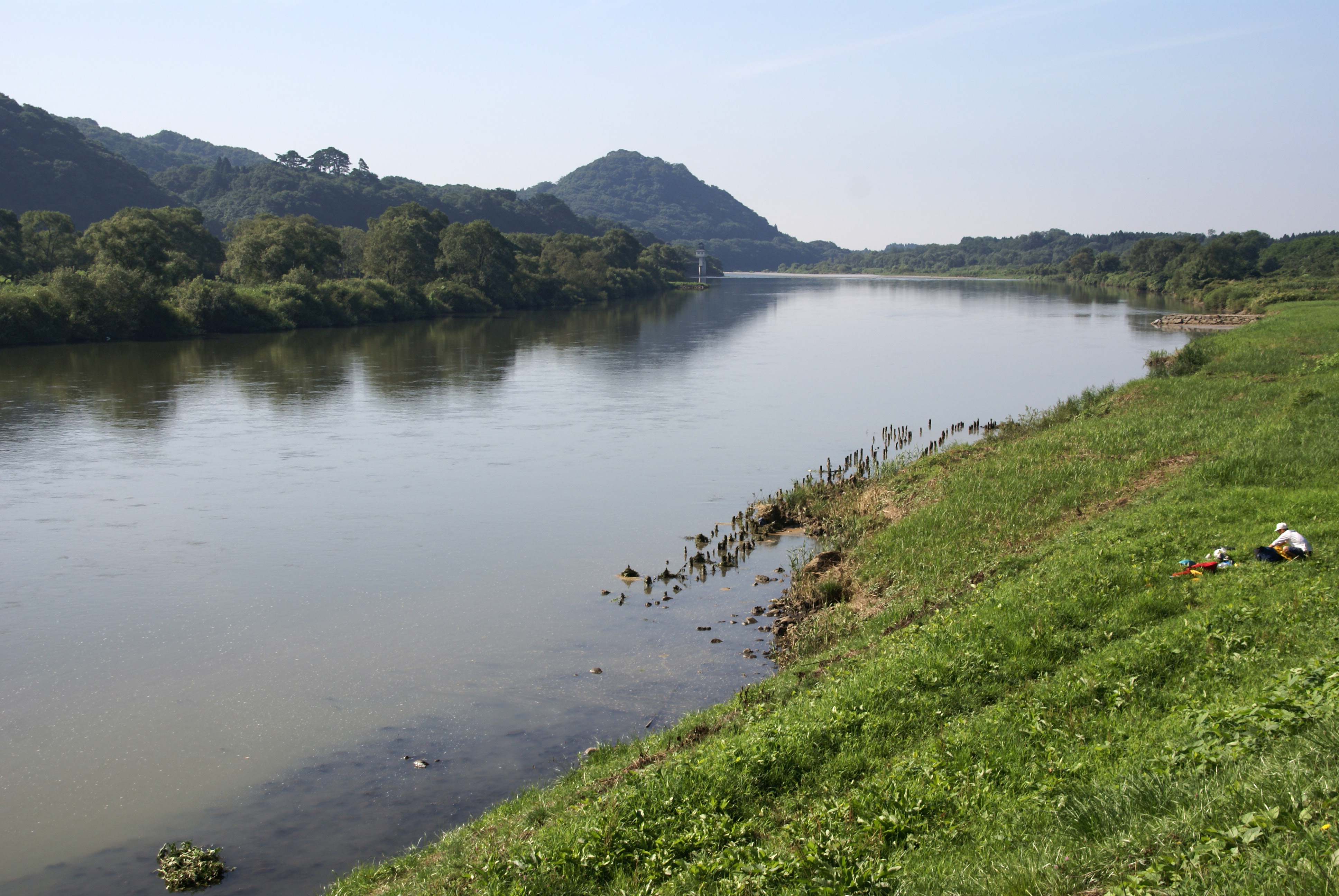 Kitakami River at Kitakami, Iwate prefecture, Japan